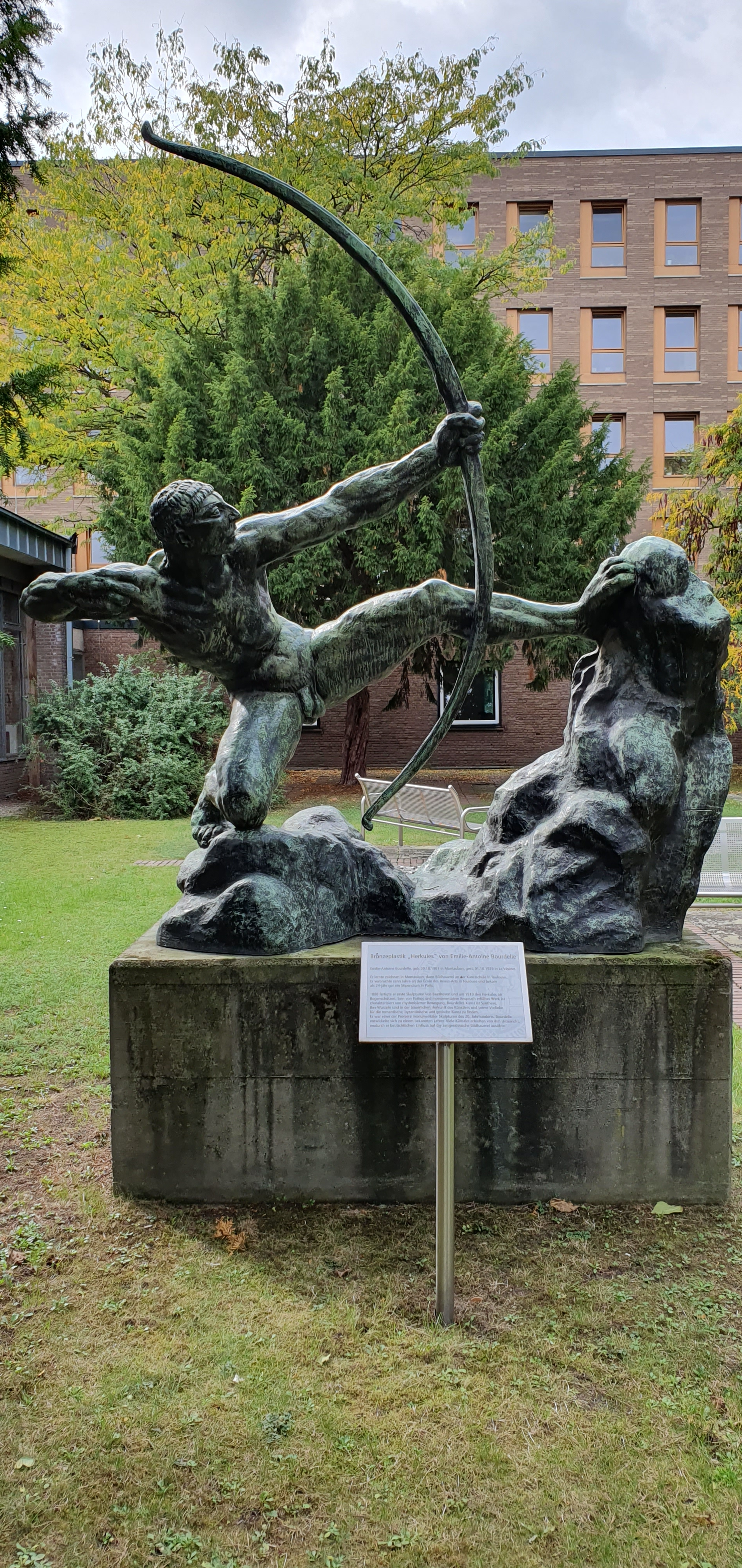 Herakles tötet die stymphalischen Vögel von Antoine Bourdelle in Köln 2019